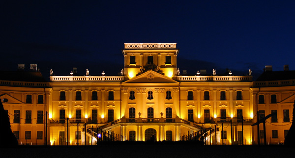 Hongrie : Ferhöd, le Palais Esterhazy de nuit ; Hungary, Ferhöd, Esterhazy palace by night.